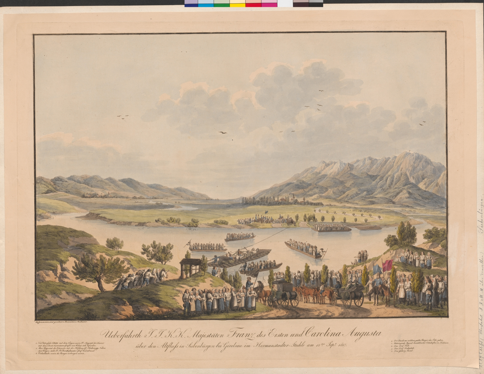 Ueberfahrt I.I.K.K. Majestäten Franz des Ersten und Carolina Augusta über den Altfluss in Siebenbürgen bei Girelsau in Hermannstaeder-Stuhle am 12ten Sept. 1817